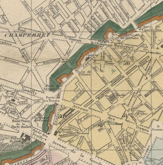 Nouveau Plan complet illustré de la ville de Paris en 1872 / dressé par A. Vuillemin, divisé en 20 arrondissements extrait avec porte des sablons et porte de la révolte